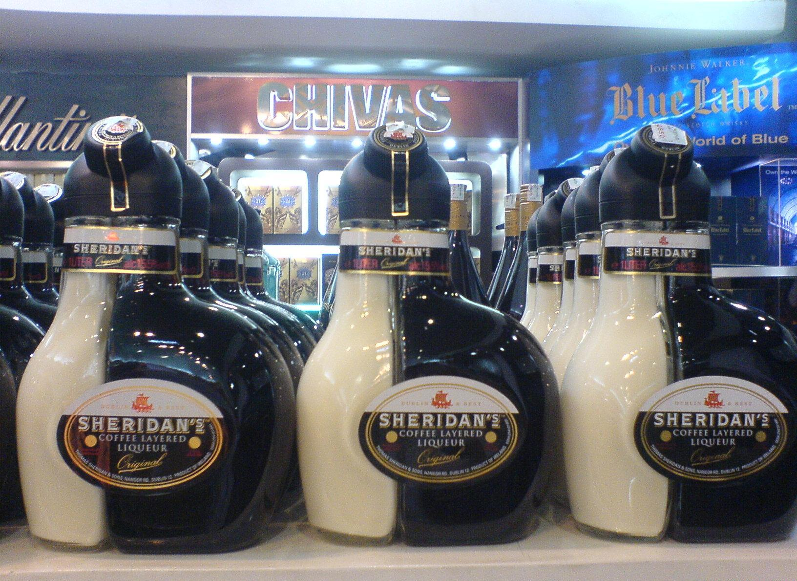 Sheridan's liqueurs at Noi Bai airport duty-free shop